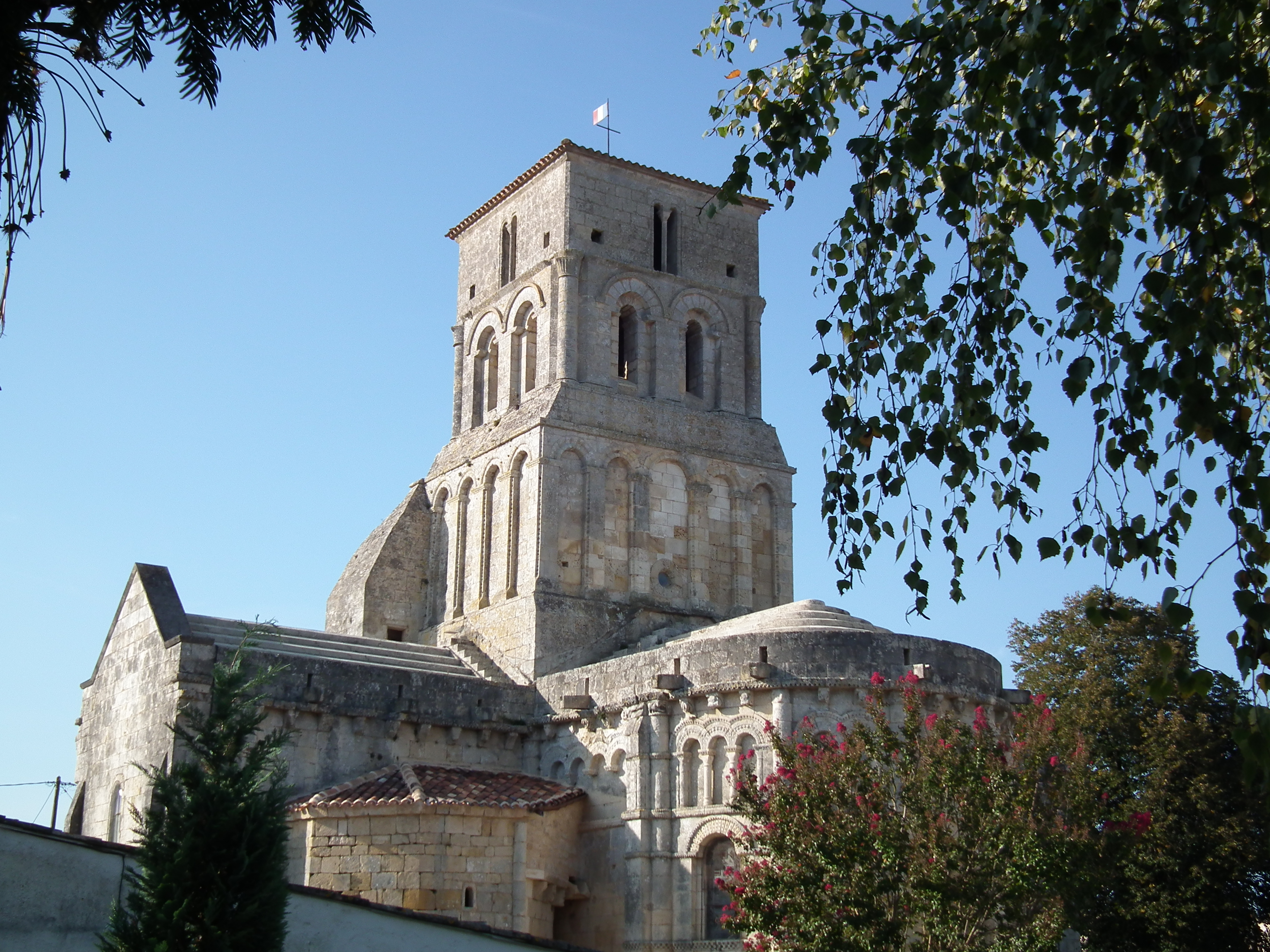 L'église romane de Champagnolles